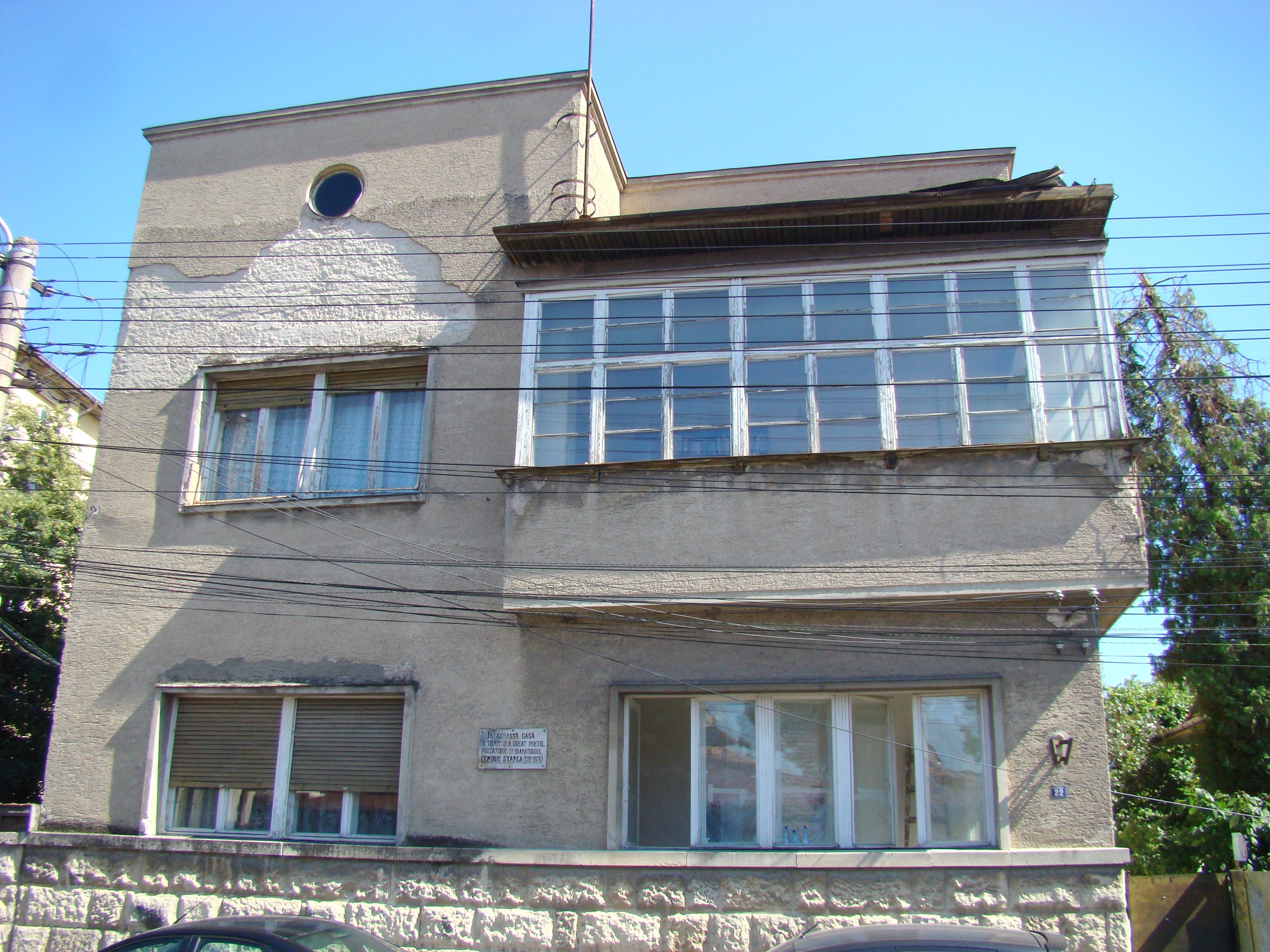 Casa în care a locuit Dominic Stanca